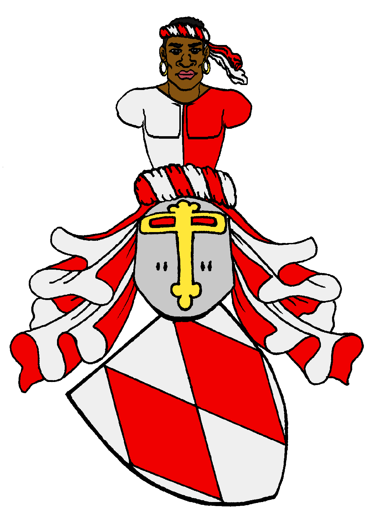 Wappen der Herren von Könitz, später Freiherren von Könitz